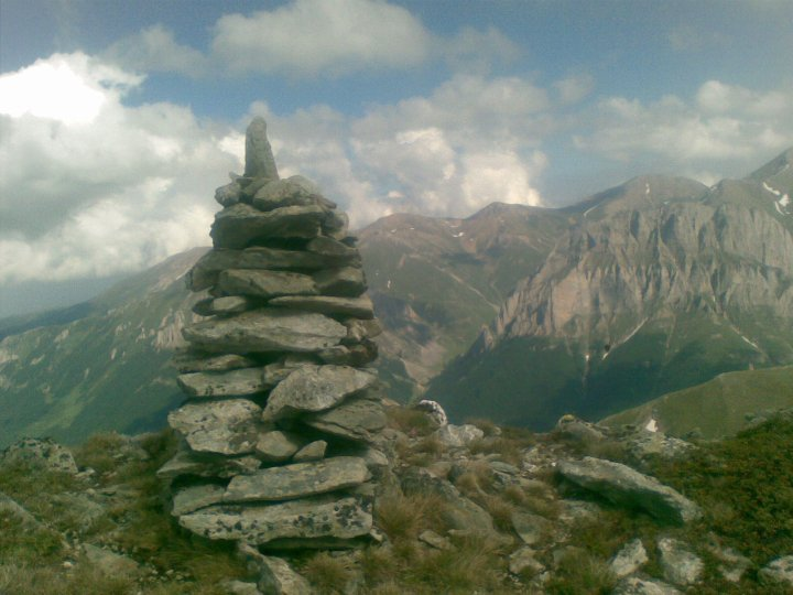 Foto e bere ne bjeshket e Sharrit ne kufirin ne mes Shqiperis, Kosoves dhe Maqedonis